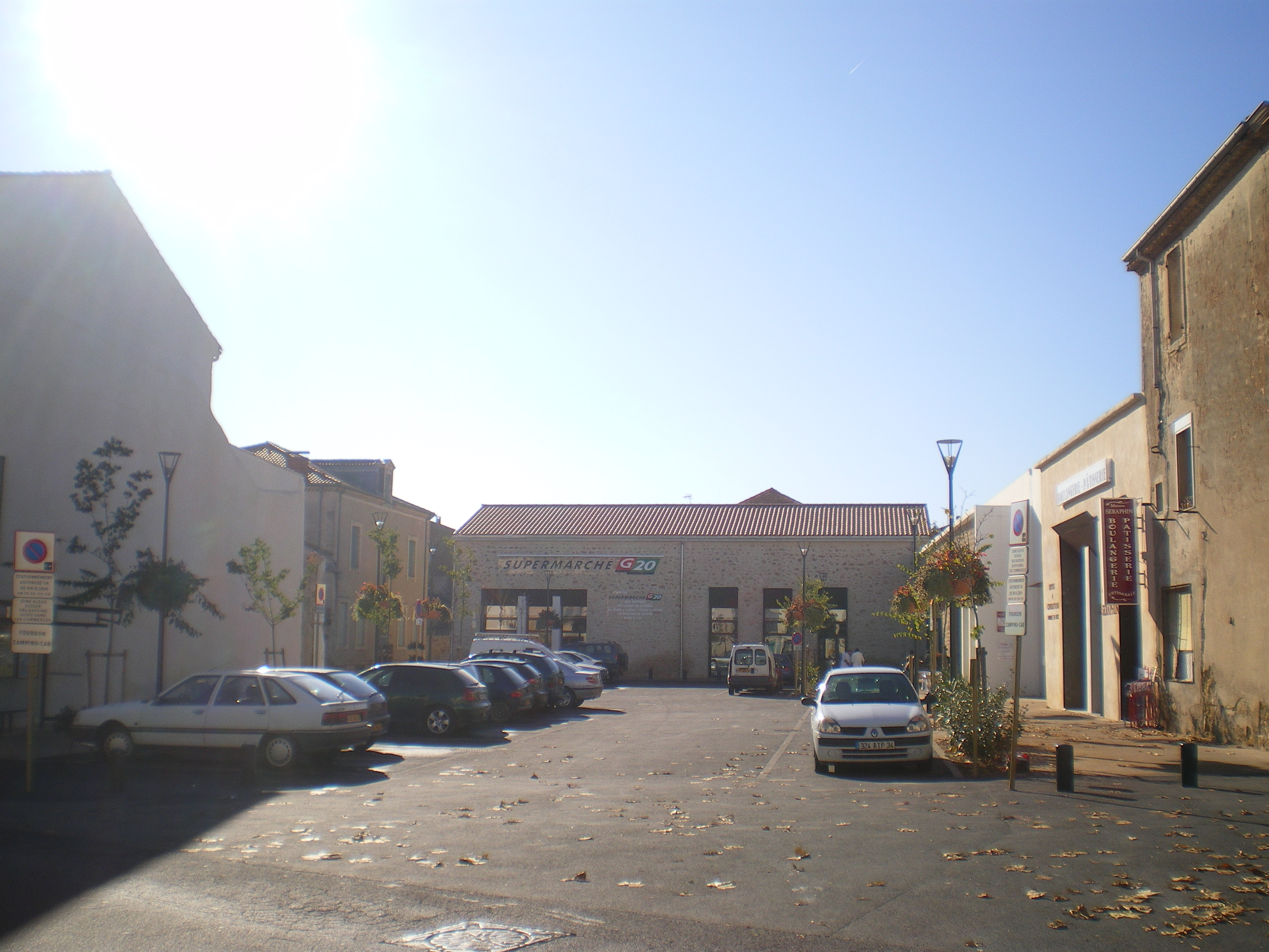 Place Sainte Thérèse, place de la République, Puisserguier (Hérault, France).